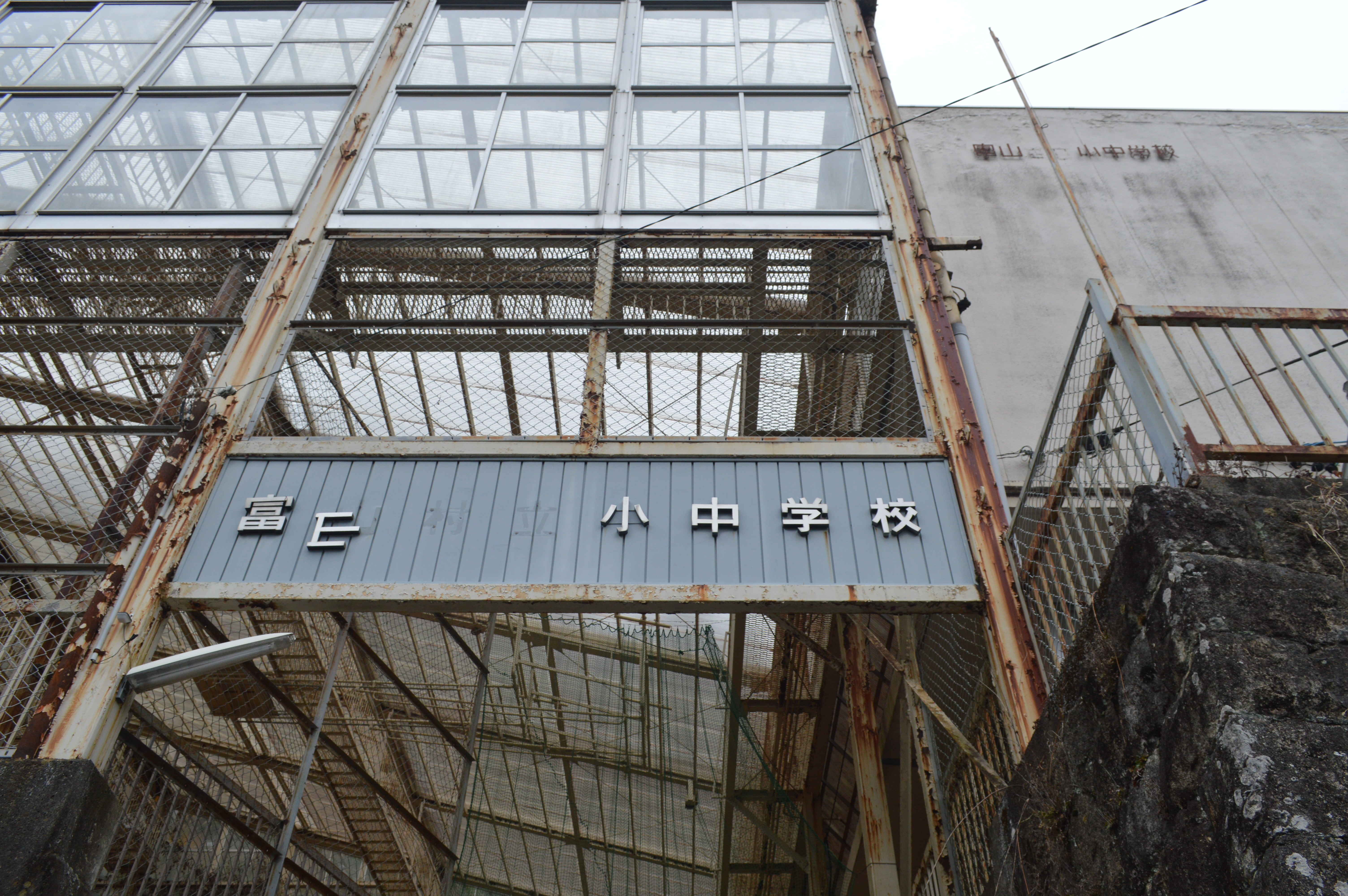 愛知県北設楽郡豊根村富山にあった豊根村立富山小中学校。2015年廃校。